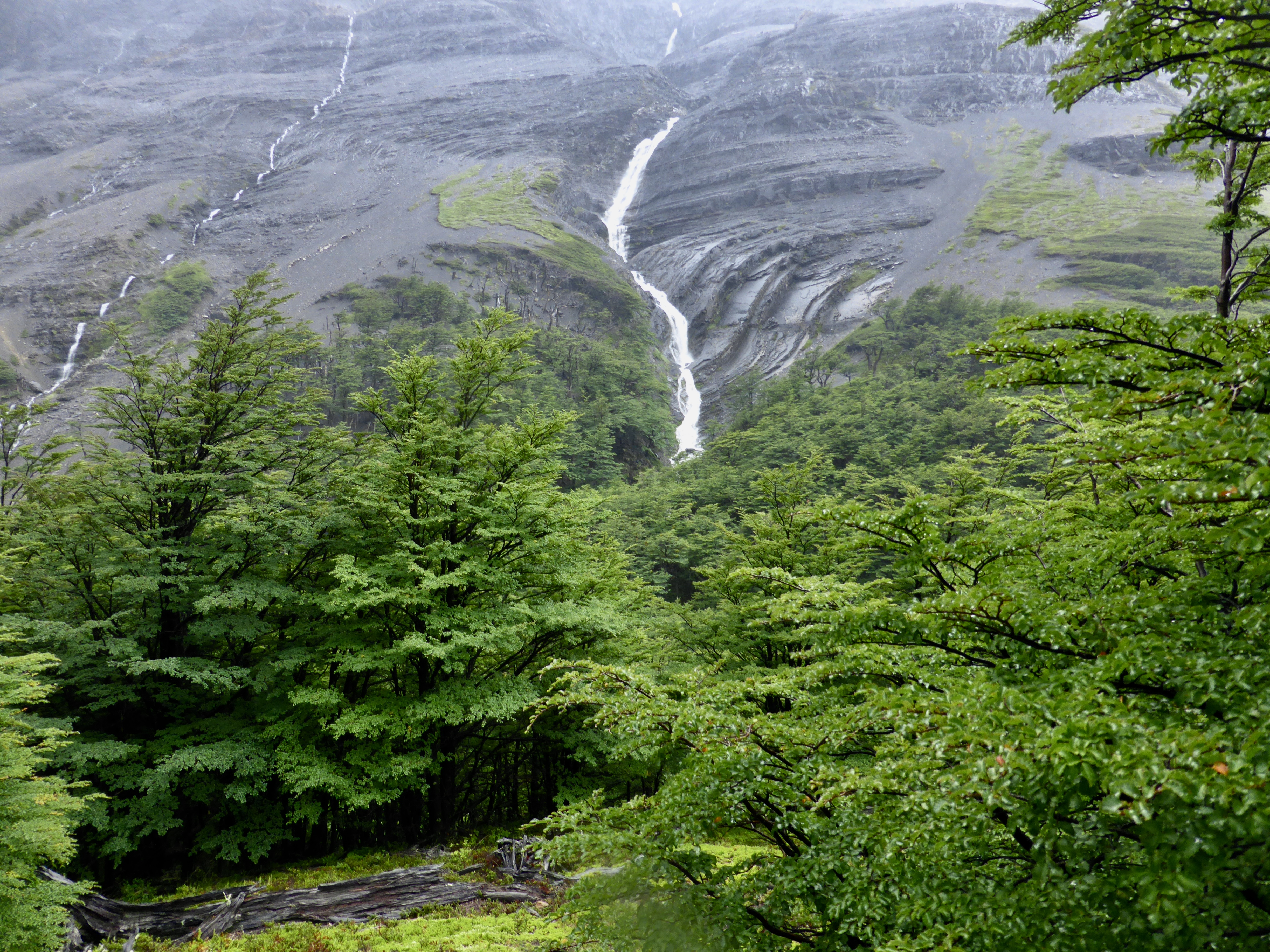 Descendiendo entre el mirador Base de las Torres y el Refugio Chileno, con fuerte lluvia. Fotografía tomada en el verano austral.